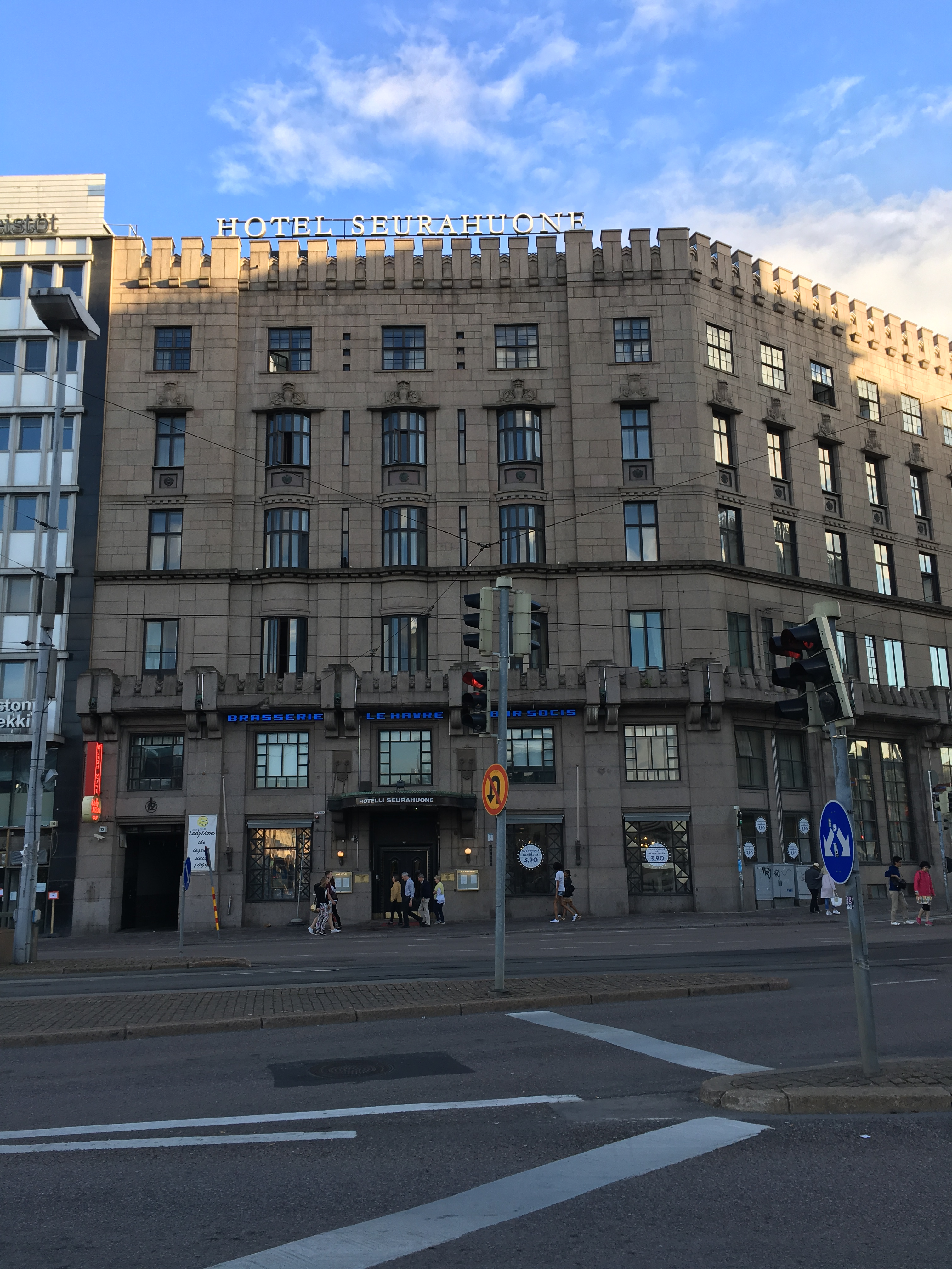 Hotelli Seurahuone, Helsinki